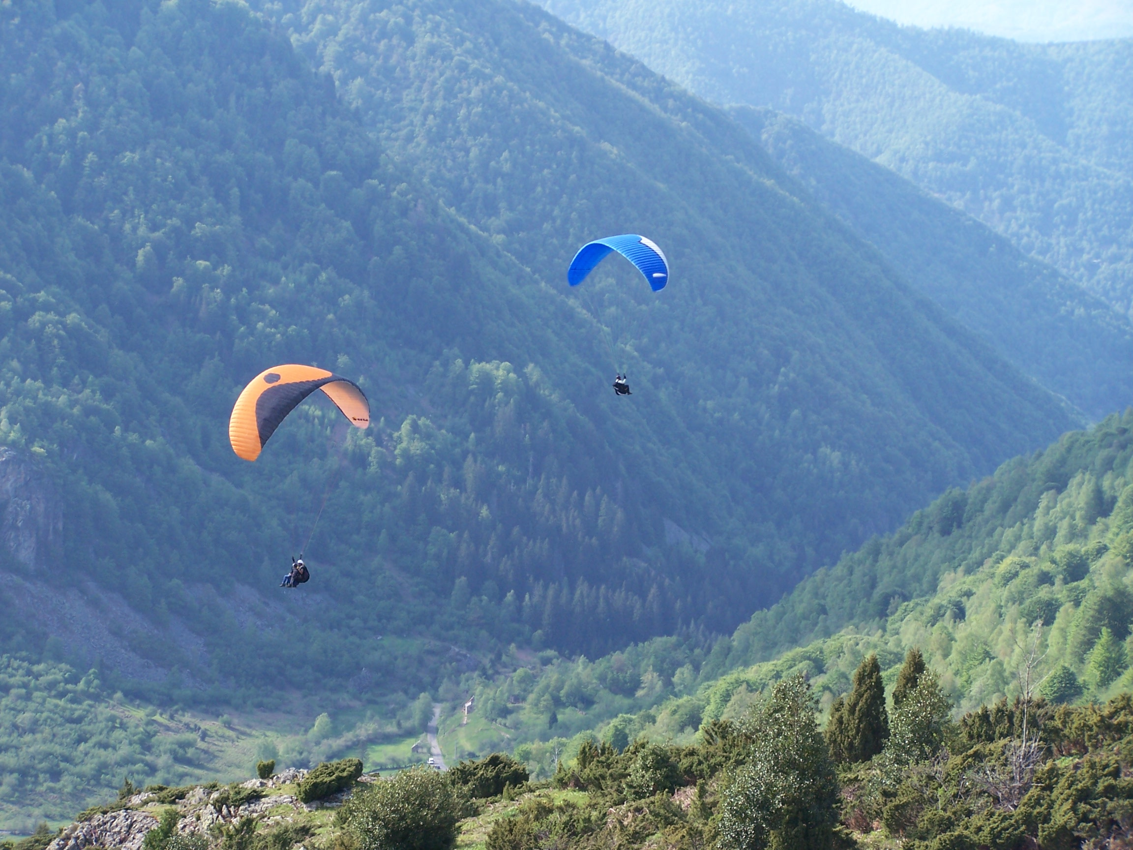 Parapentes au Port de l'Hers (Ariège)